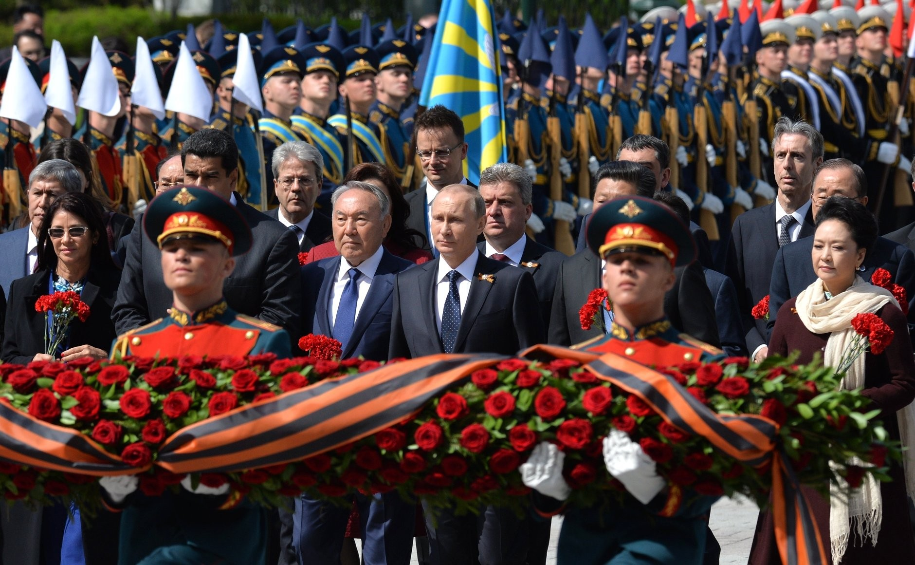 Вместе с главами иностранных государств и правительств Владимир Путин почтил память погибших в Великой Отечественной войне, возложив цветы к Могиле Неизвестного Солдата в Александровском саду.